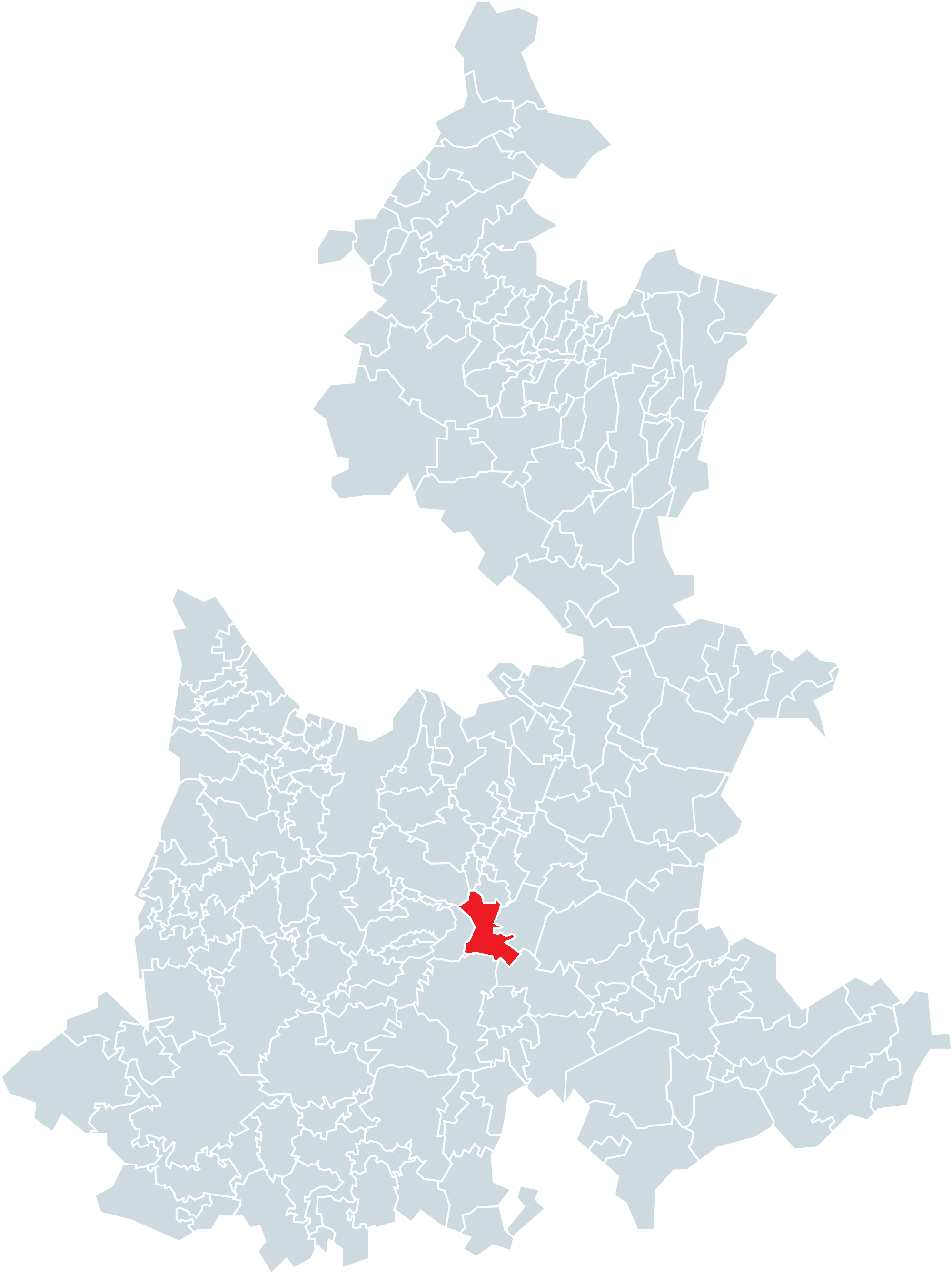 Municipio de Molcaxac